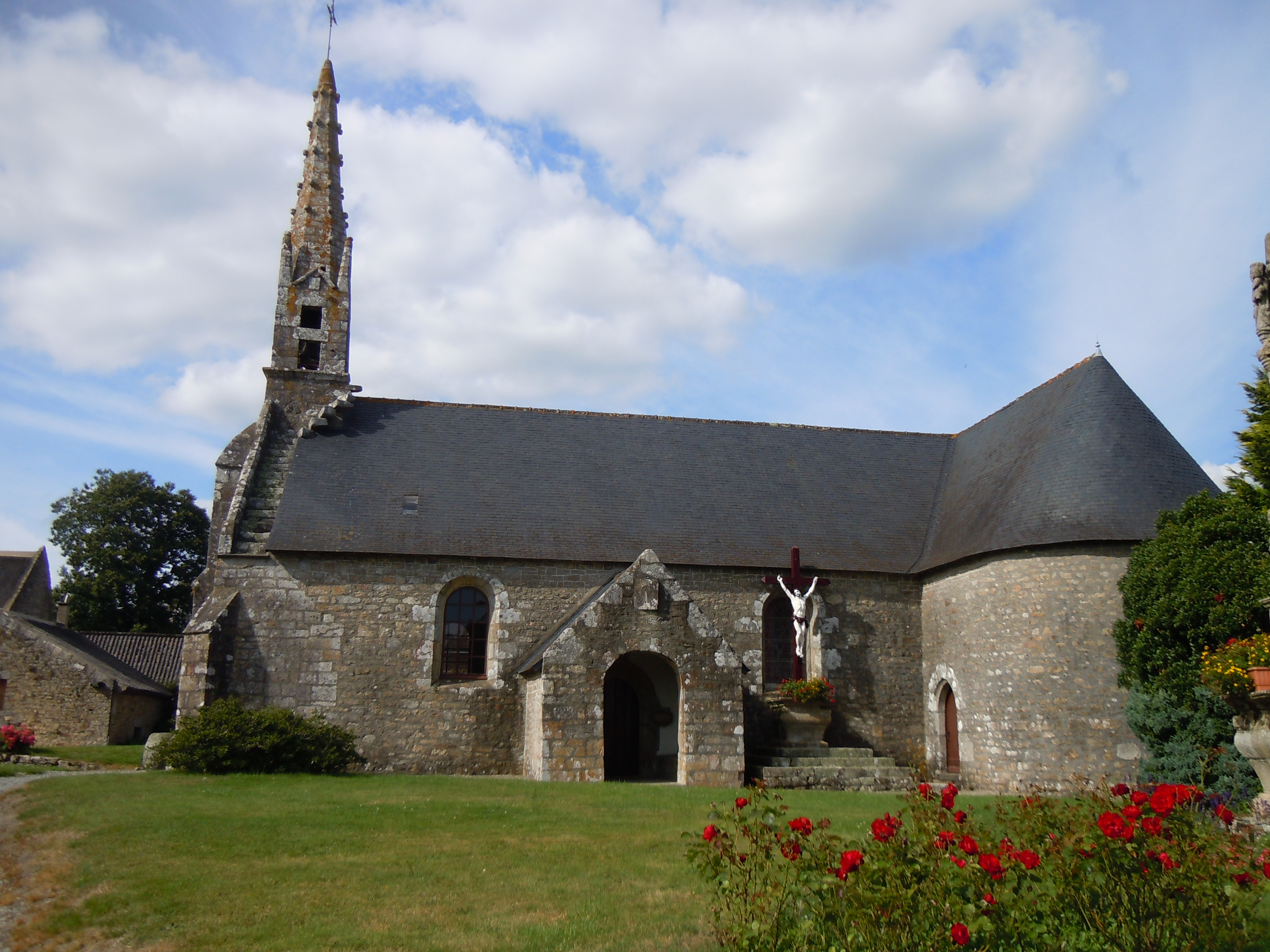 Façade sud de l'église paroissiale de Lanvaudan dédiée à Saint Maudez (département du Morbihan)